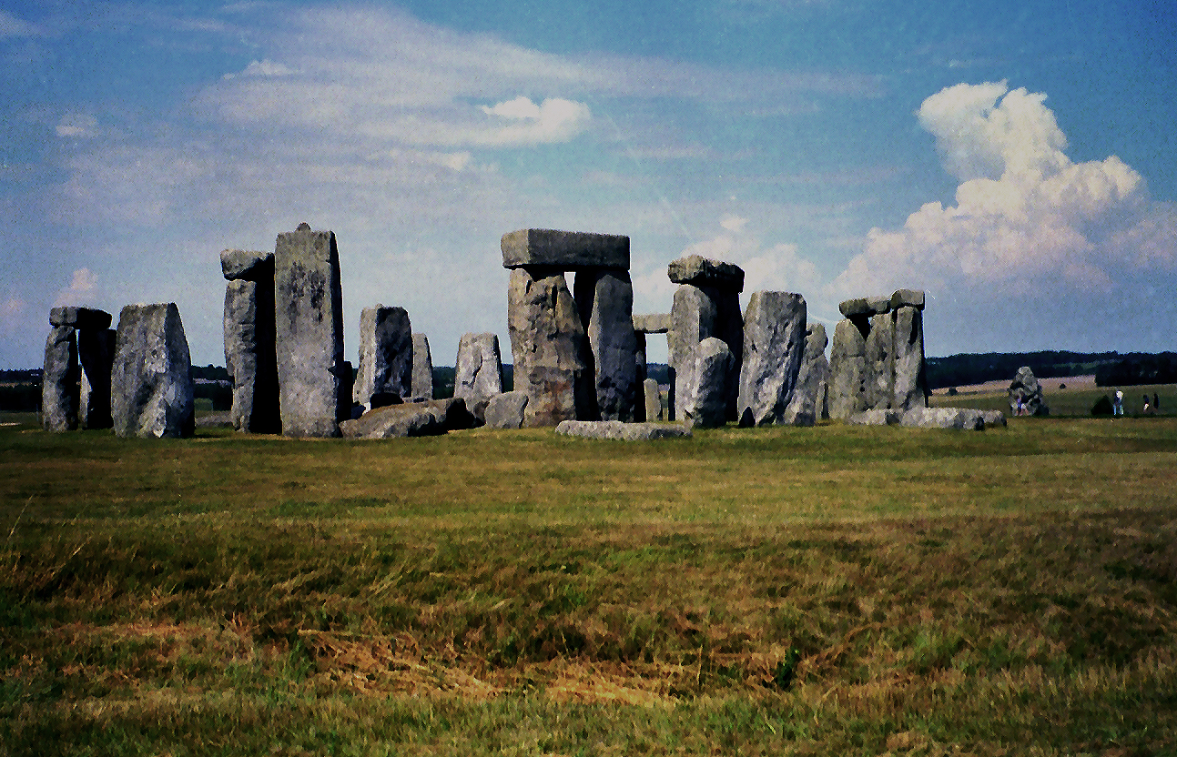 Stonehenge